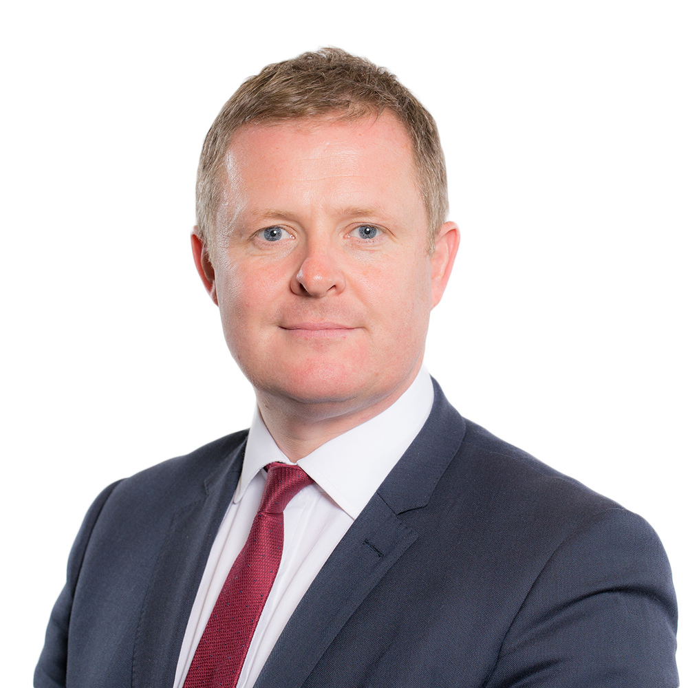 Plaid: Llafur Cymru Etholaeth: Castell-nedd Party: Welsh Labour Constituency: Neath